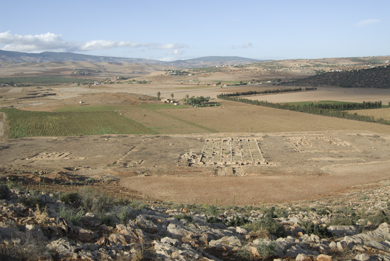 Römisches Arbeitslager in in Chimtou, Tunesien